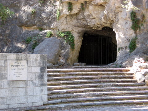 bnei brit